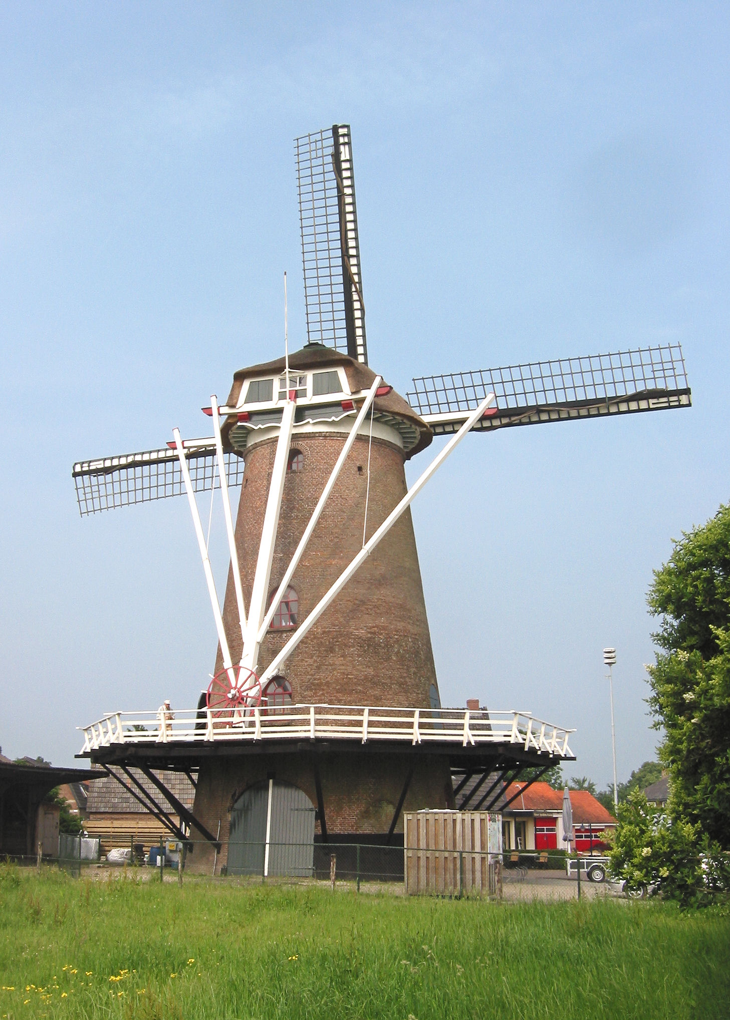 De Hoop in Garderen, Gelderland, the Netherlands